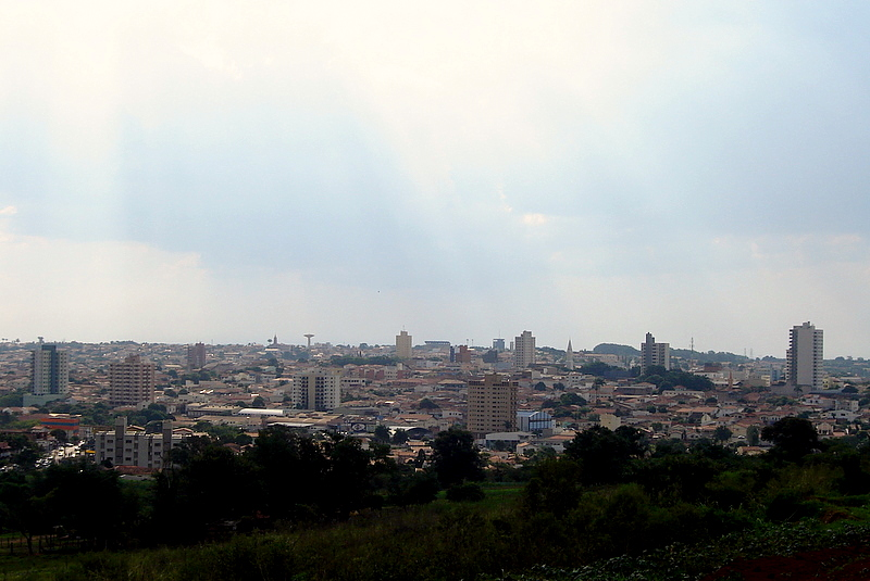 Cidade de Santa Bárbara d'Oeste